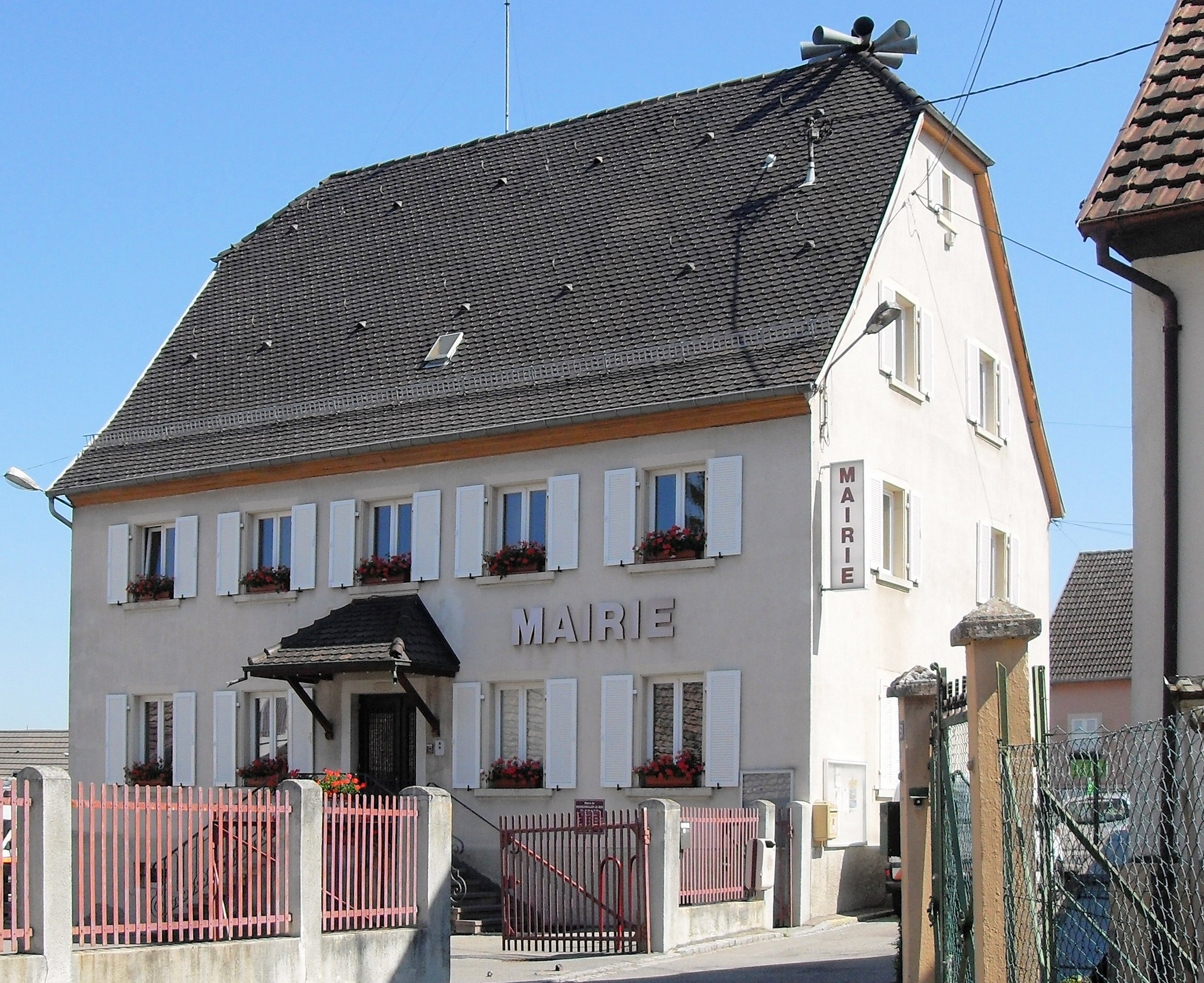 La mairie de Morschwiller-le-Bas